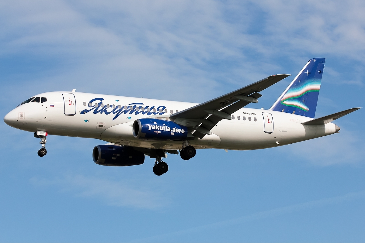 Sukhoi Superjet 100-95 (RA-89011)